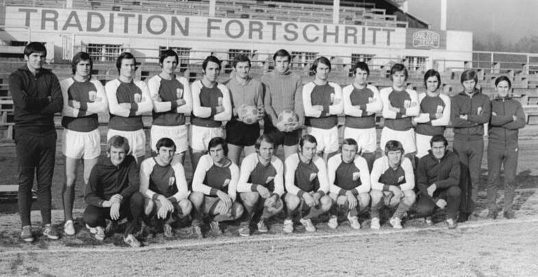 Title: Mannschaftsfoto FC Carl Zeiss Jena Factual corrections and alternative descriptions are encouraged separately from the original description. Additionally errors can be reported at this page to inform the Bundesarchiv. Original historic description: ADN-ZB-Liebers-4.12.73-wen-Jena: Fußball-Oberligamannschaft FC Carl Zeiss Jena. Stehend von links: Cheftrainer Hans Meyer, Lothar Kurbjuweit, Dieter Scheitler, Gerhard Hoppe, Michael Strempel, Wolfgang Blochwitz, Hans-Ulrich Grapentin, Harald Irmscher, Eberhard Vogel, Martin Göbel, Norbert Schumann, Masseur Dieter Freund und Mannschaftsarzt Dr. Wolfgang Eger. Vordere Reihe von links: Assistenztrainer Bernd Stange, Andreas Wachter, Peter Ducke, Udo Preusse, Peter Rock, Rainer Schlutter, Eberhard Weise und Mannschaftsleiter Walter Egelmeier.